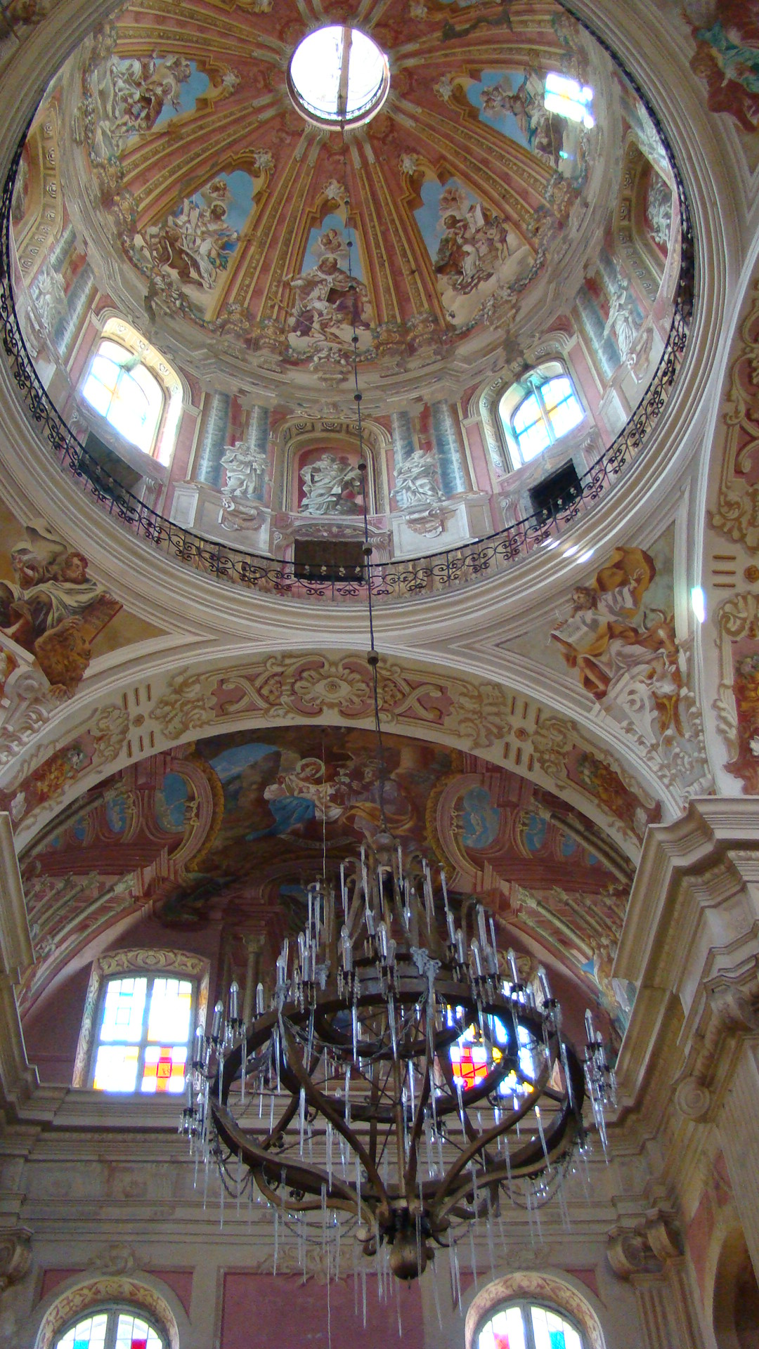 Беларуская (тарашкевіца): Комплекс былога кляштара езуітаў:касьцёл Божага Цела з дэкаратыўным аздабленьнем:росьпісы ў інтэр’еры, выкананыя пад кіраўніцтвам К. Д. Гескага; алтарная карціна «Тайная вячэра» К. Д. Гескага;надмагільныя помнікі і барэльефы: Мікалая Крыштапа Радзівіла Сіроткі, Канстантына Радзівіла, Эльжбеты Яўфіміі Радзівіл, Крыштапа Радзівіла, Ігната Мураўскага, Канстанцыі Радзівіл, Людвіка Кандратовіча (У. Сыракомля);скульптуры на галоўным фасадзе:Сьв. Крыштапа, Сьв. Мікалая, Сьв. Францішка Ксаверыя, Ігнація Лаёлы;пахавальная крыпта роду Радзівілаў (70 трун-саркафагаў, канопа і урна з прахам);вежа;капліца Булгарына;агароджа з брамай. г. Нясьвіж This is a photo of Belarusian heritage monument. Reference number: 610Г000465 ( WLM)